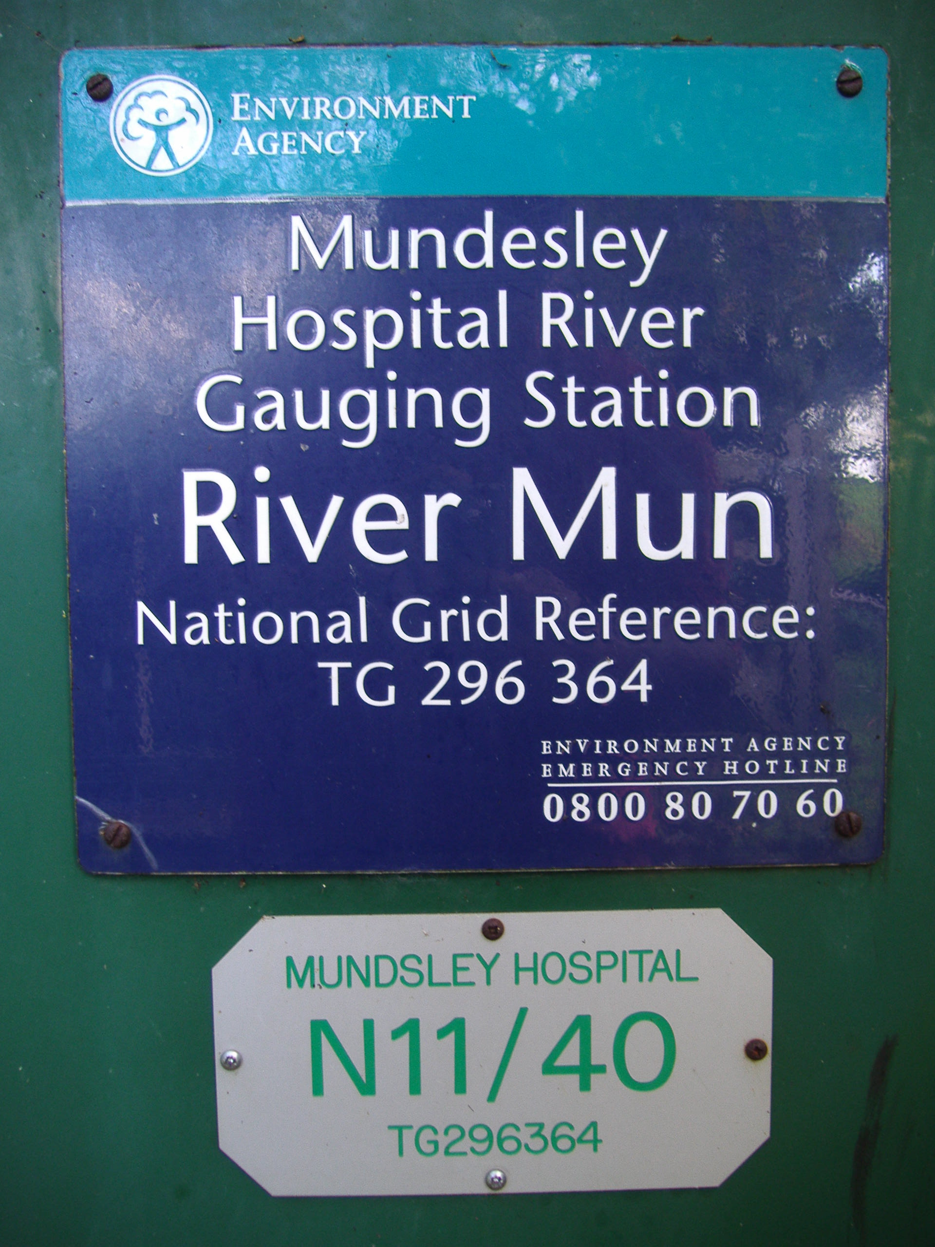 Water Gaugeing station sign,River Mun near Mundesley Hospital, Norfolk